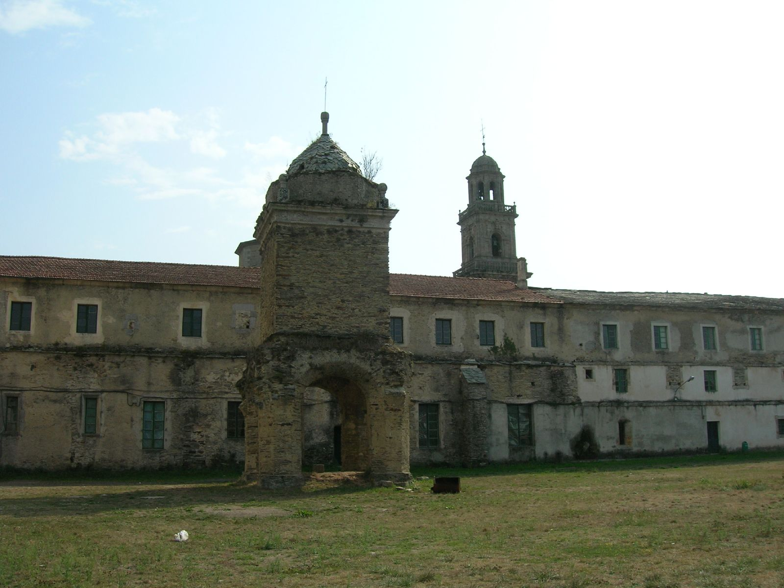 Mosteiro de San Salvador de Lourenzá